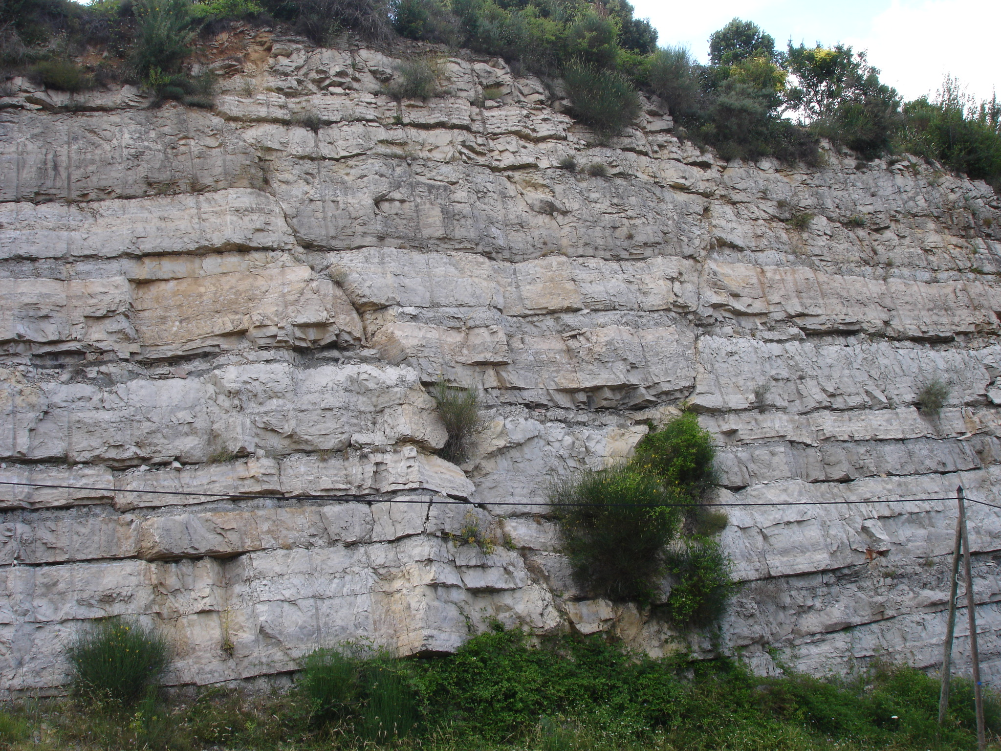 France, Hérault (34), Mourèze, Graben et horst